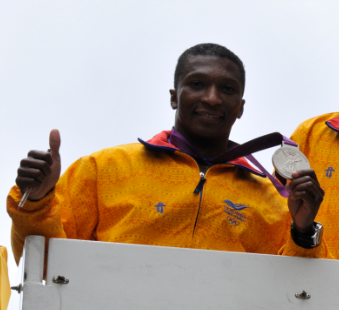 Figueroa en Caravana de medallistas olímpicos